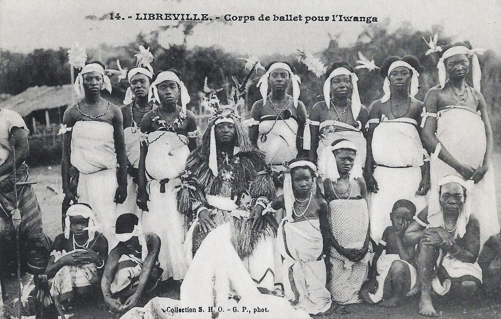 Libreville. Corps de ballet pour l'Iwanga. Collection S.H.O. - G.P. phot.